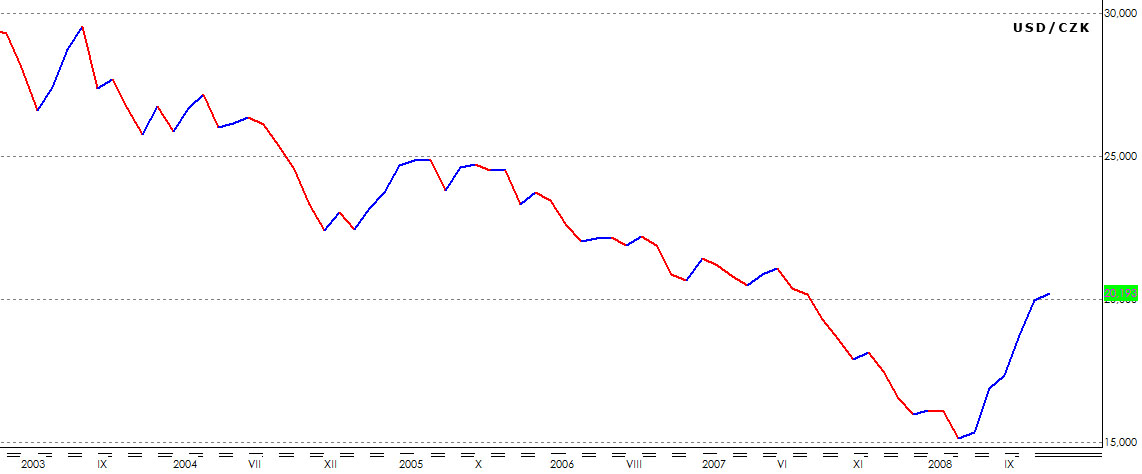 Příklad liniového grafu. Slouží pro ukázku typů grafů, používaných pro technickou analýzu.